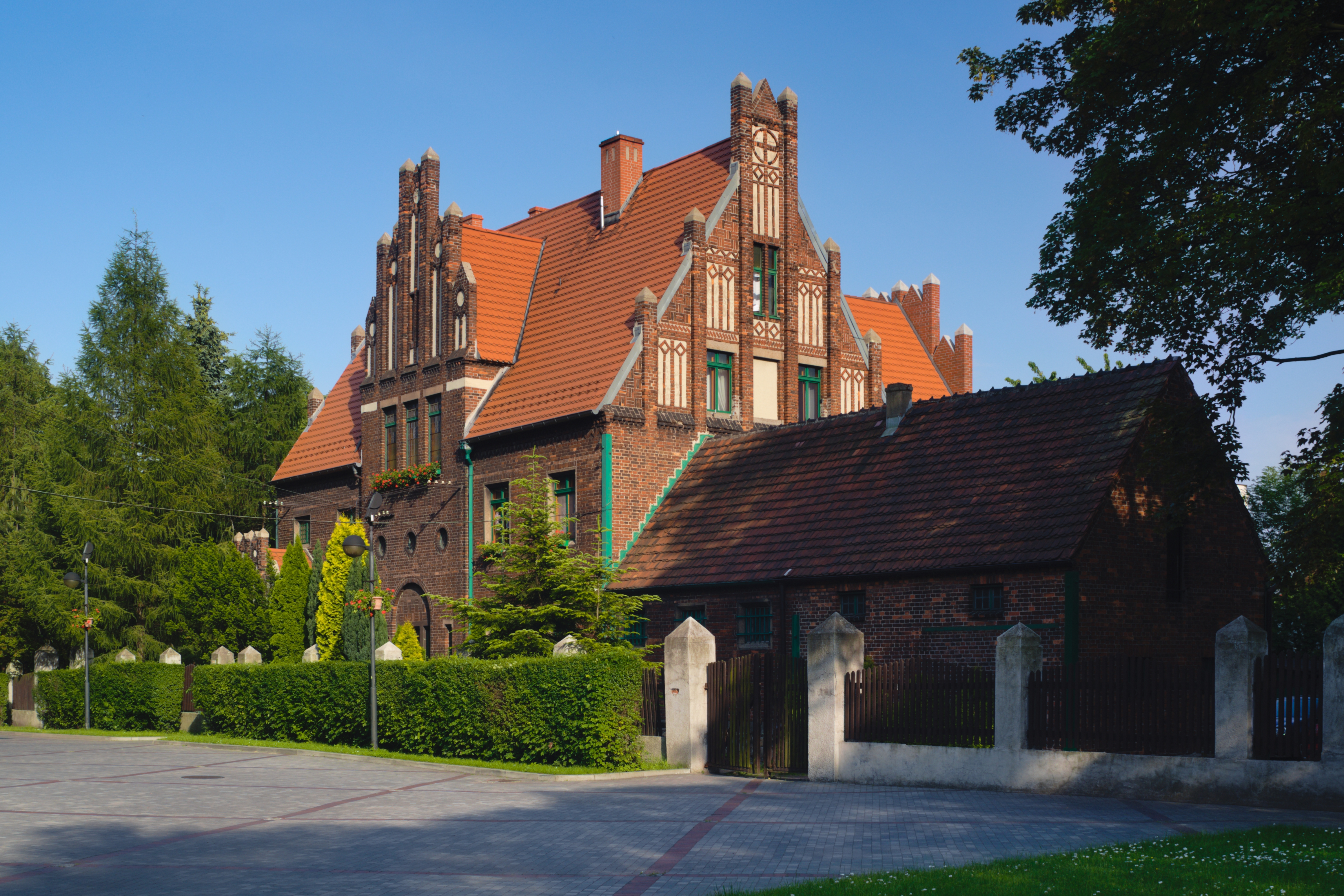 zabytkowy budynek probostwa parafii św. Józefa w Chorzowie, ul. Łagiewnicka 17